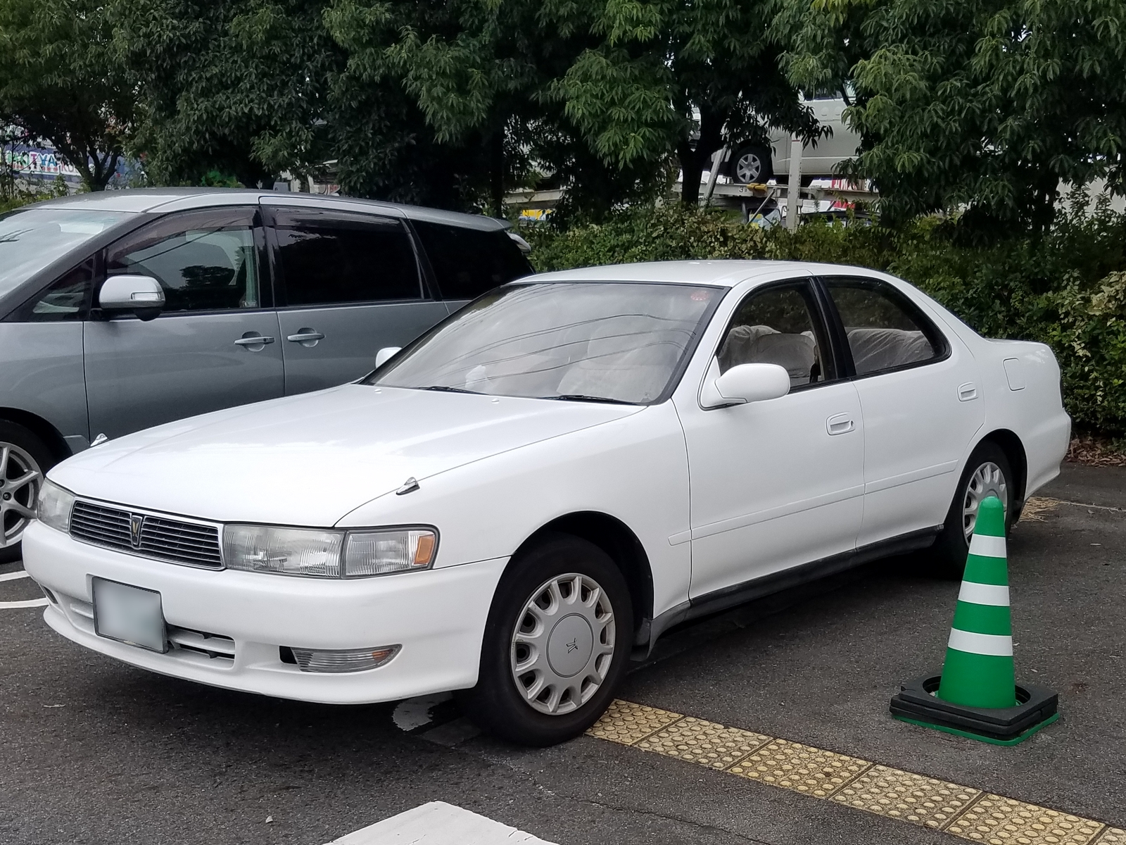 クレスタ 2.5スーパールーセント（後期型）